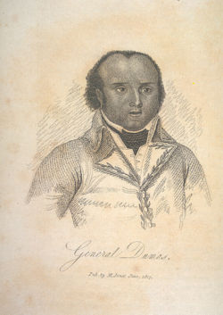 Général_Thomas_Alexandre_Davy_de_La_Pailleterie